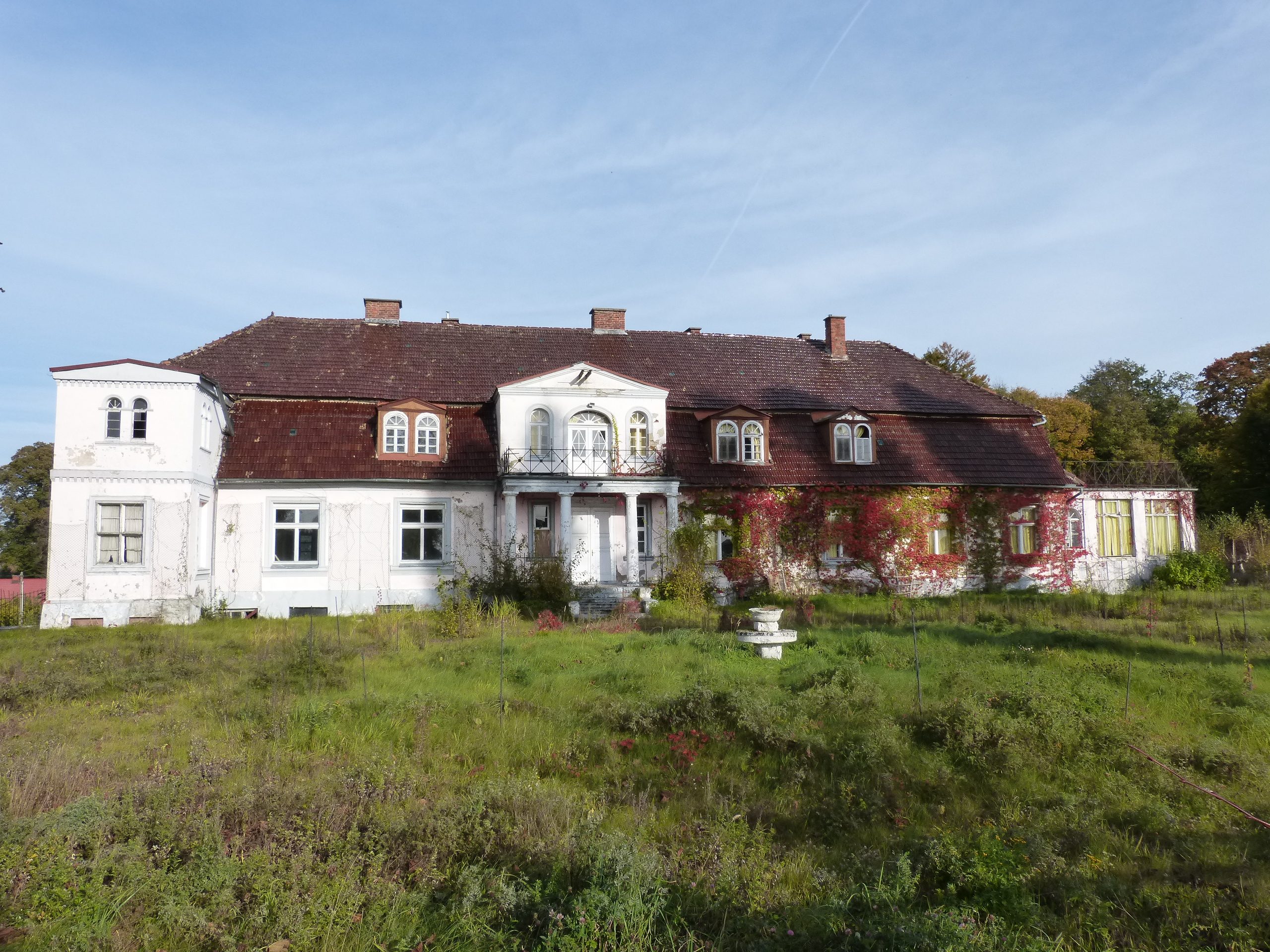 Łęgi - dwór